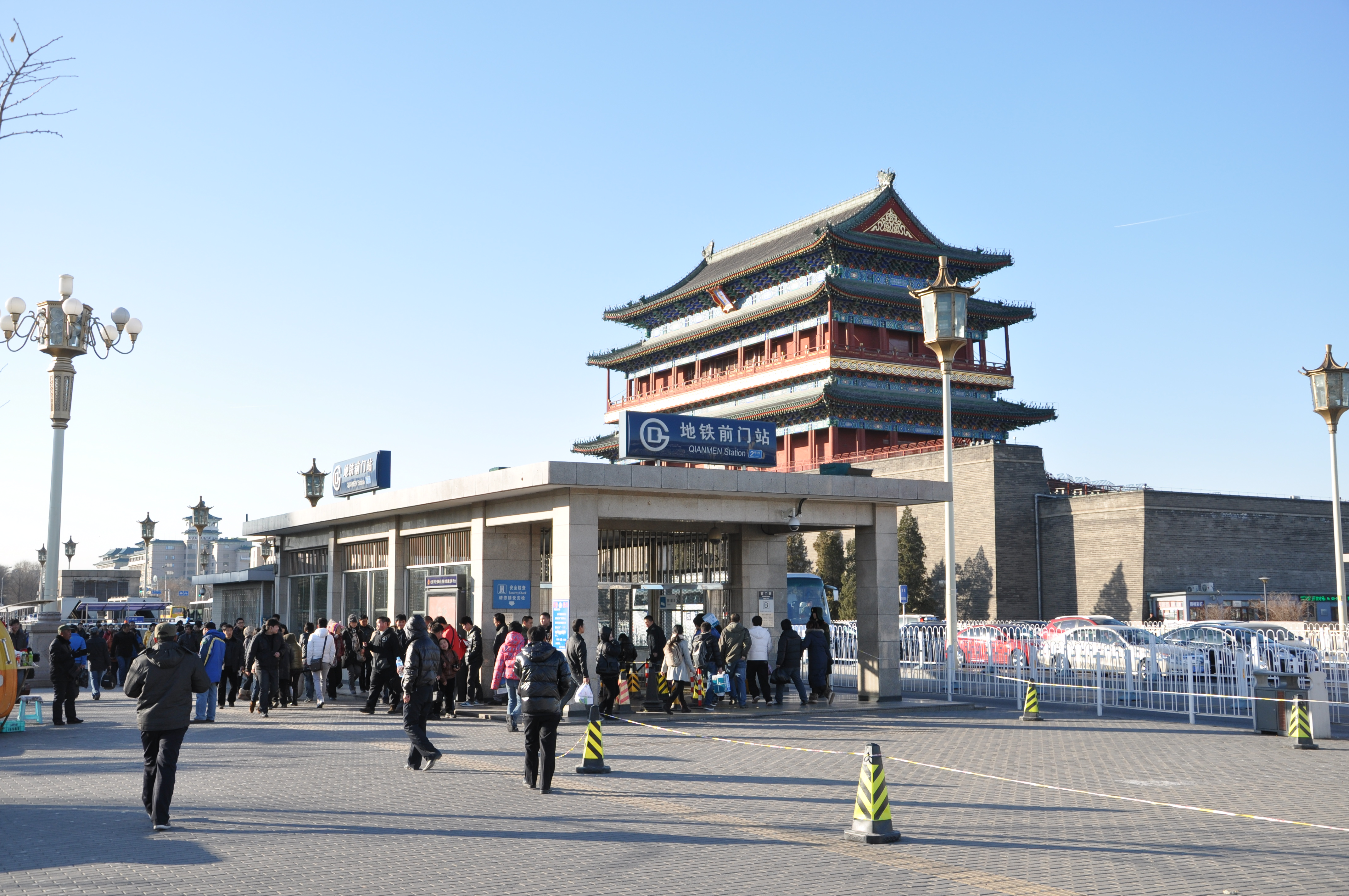 北京地铁2号线前门站B出入口。